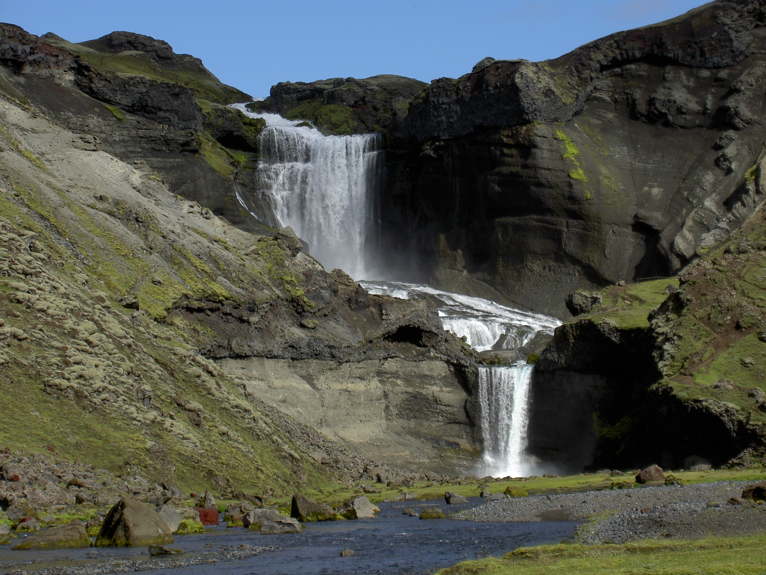 Waterfall Ófærufoss in inner Iceland